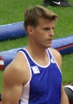 Jean Galfione aux Championnats du monde d'Helsinki en 2005.